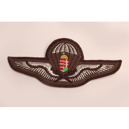 MH Altiszti-tiszthelyettesi ejtőernyős állományjelző